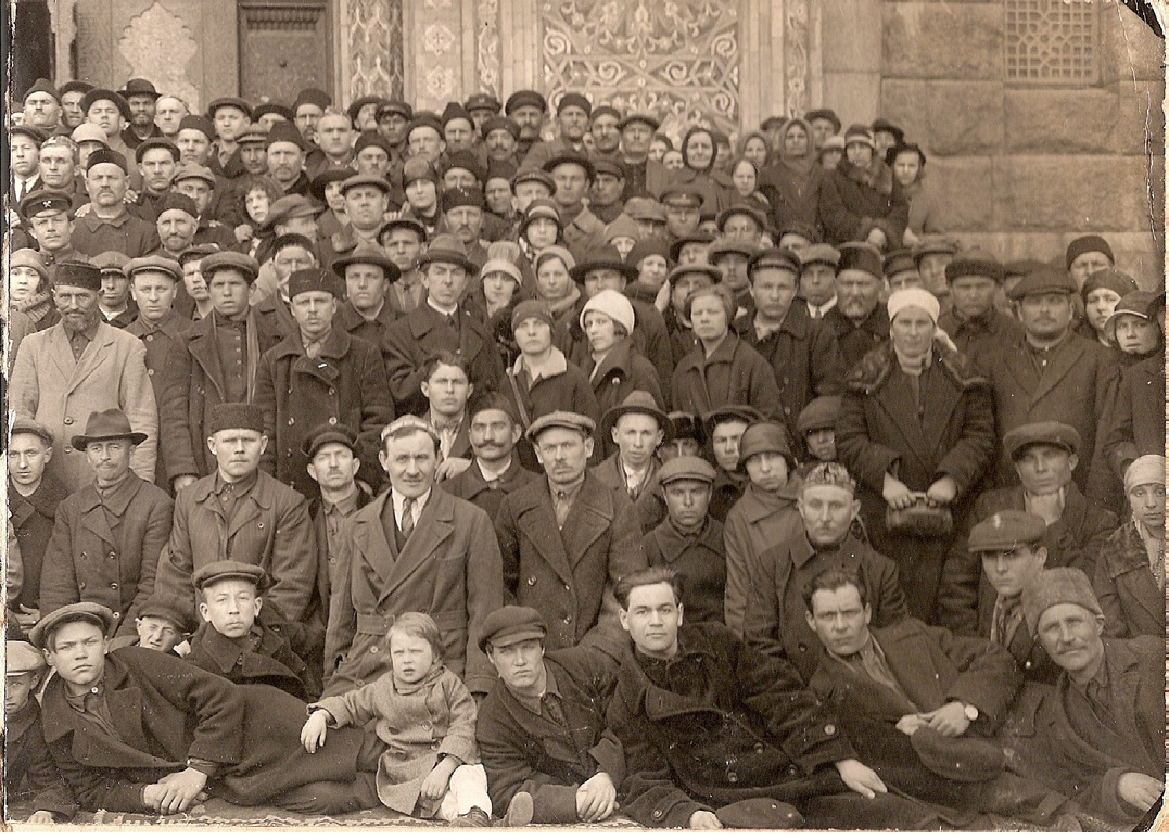 Мусульмане Ленинграда (преимущественно татары) у входа в Соборную мечеть Ленинграда. Фото 1926 года. Автор неизвестен. Из семейного архива Э.В. Тисенко